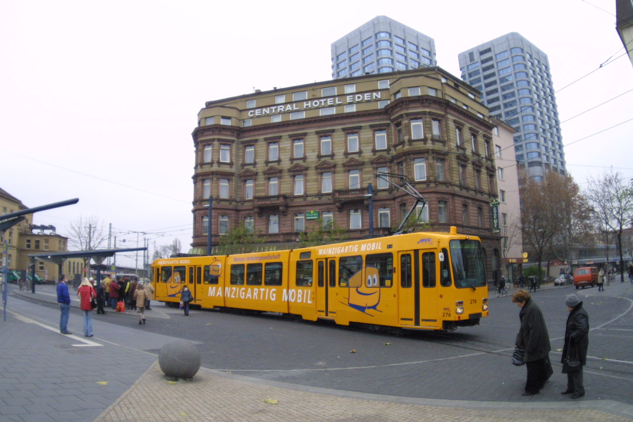 MVG-Straßenbahn 276 an der Haltestelle Hauptbahnhof